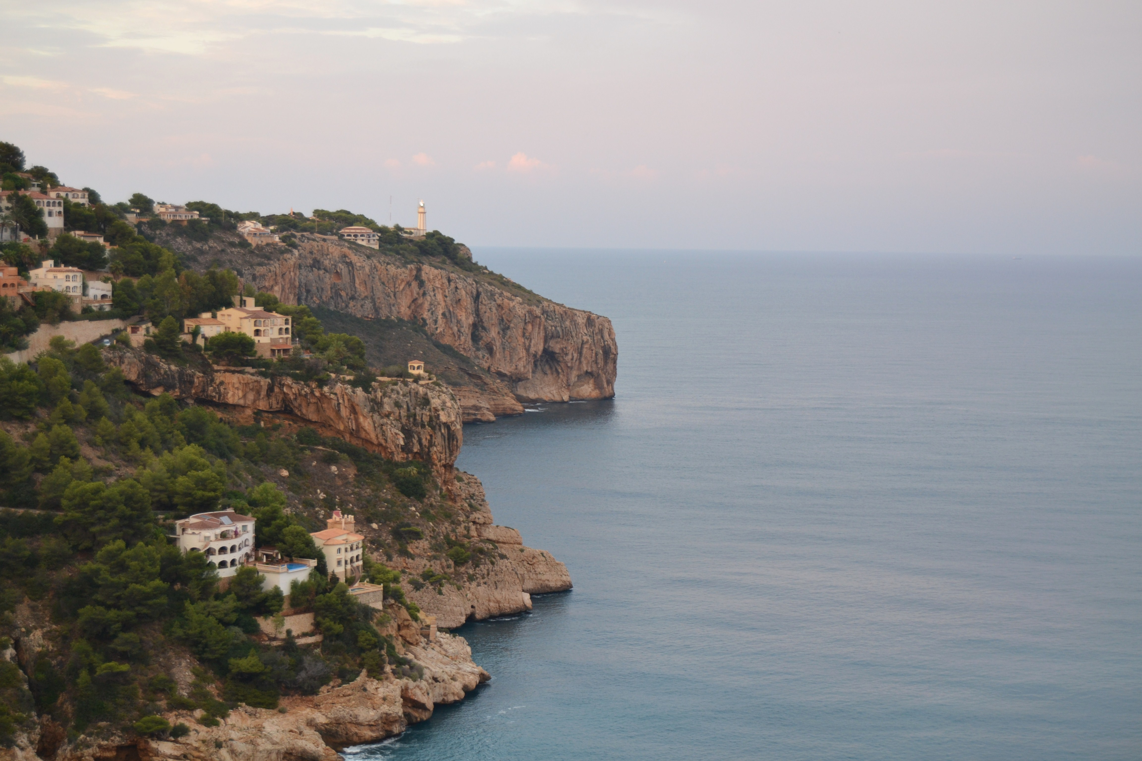 Vista del cap de la Nau des del mirador d'Ambolo.